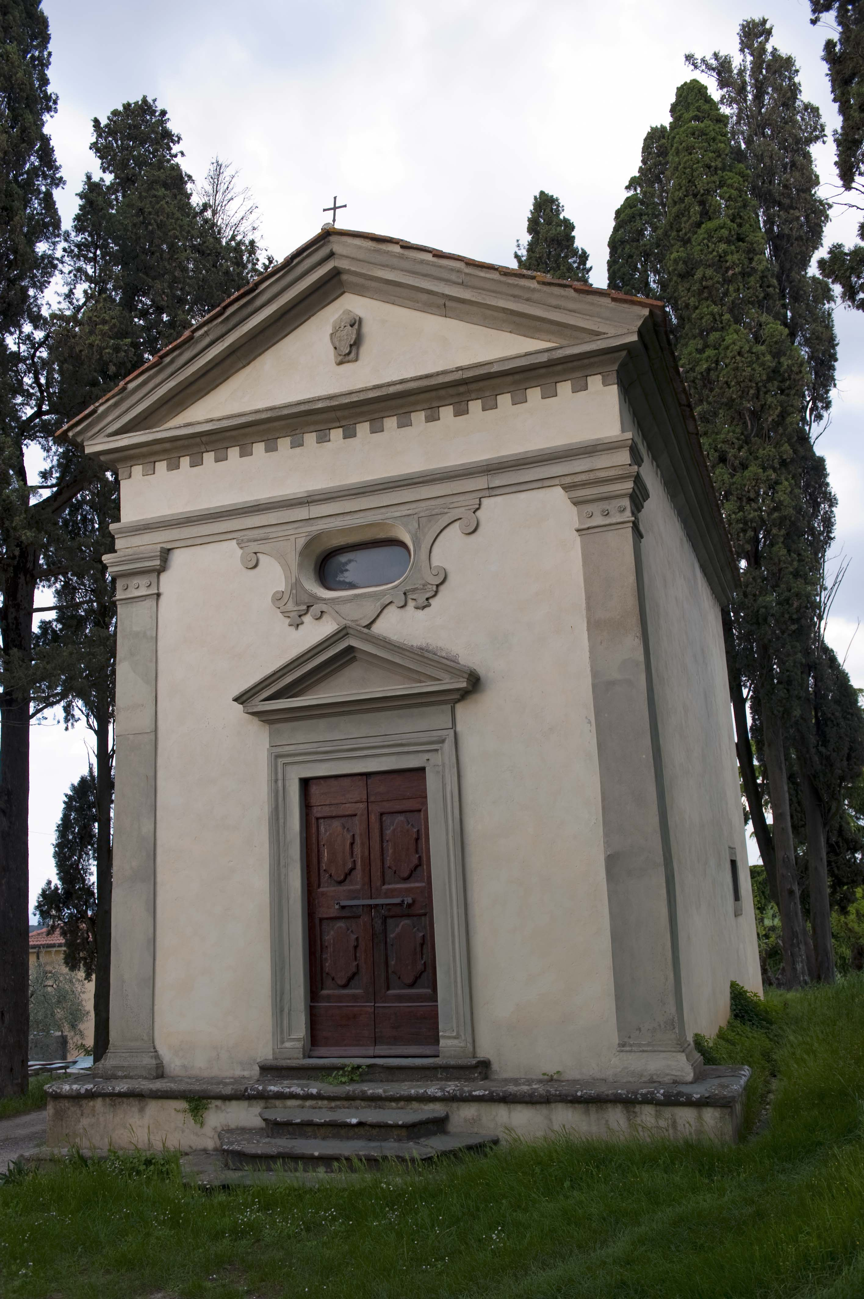 Cappella gentilizia Antinori presso la Villa del Cigliano - San Casciano in Val di Pesa - Fiernze